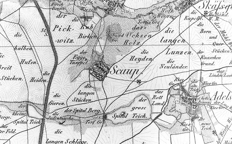 Original image description from the Deutsche Fotothek Zabeltitz-Skaup. Oberreit, Sect. Großenhain, 1841/43